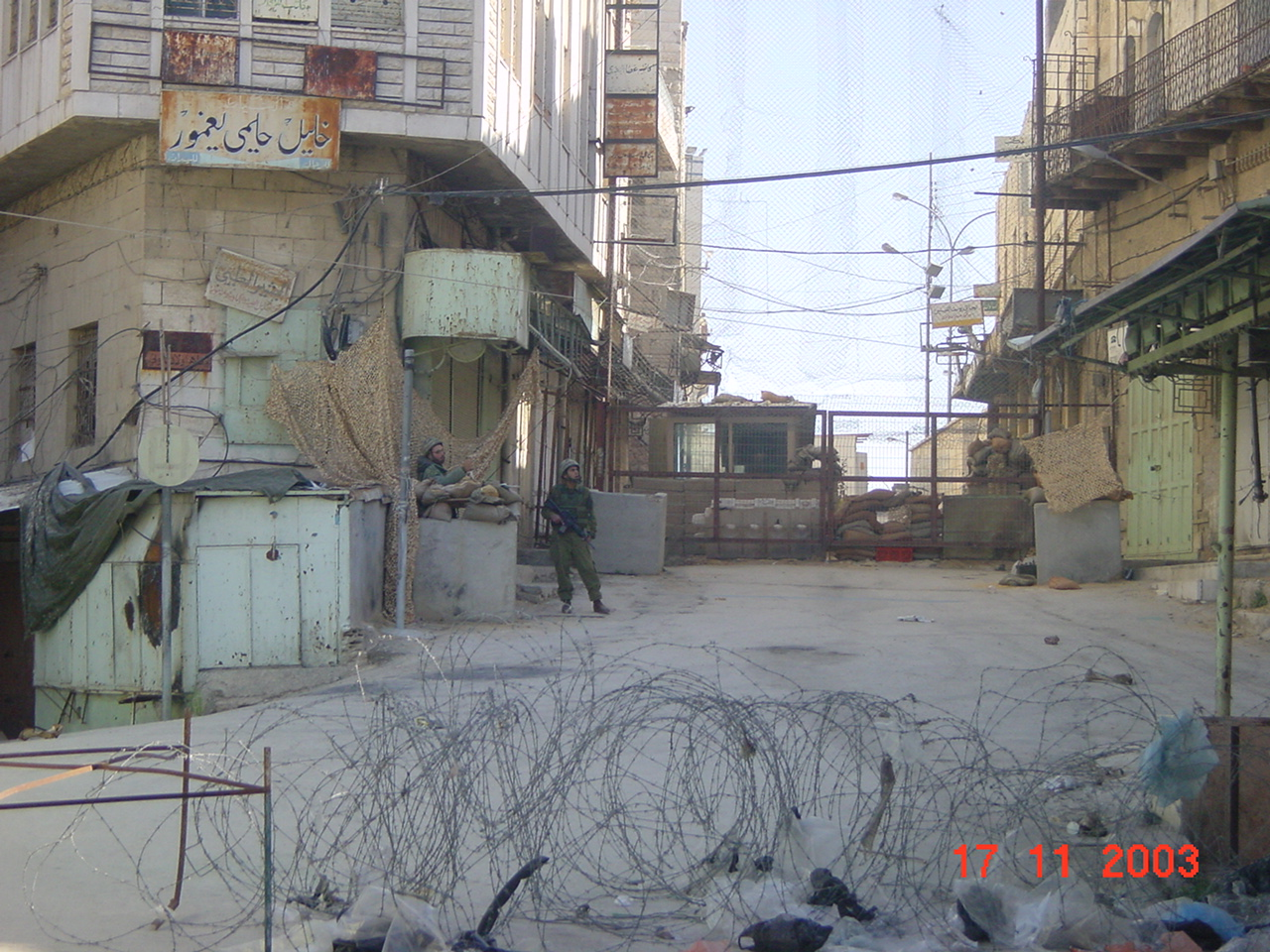 200 Siedler bewacht von 500 Soldaten, Absperrung